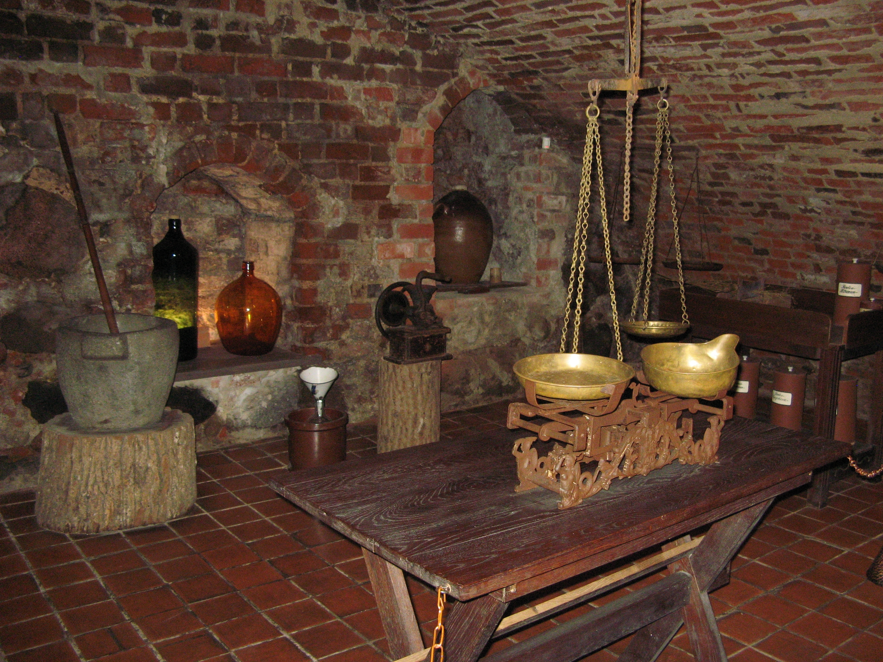 Lietuvos medicinos ir farmacijos muziejaus rūsys, Kaunas.